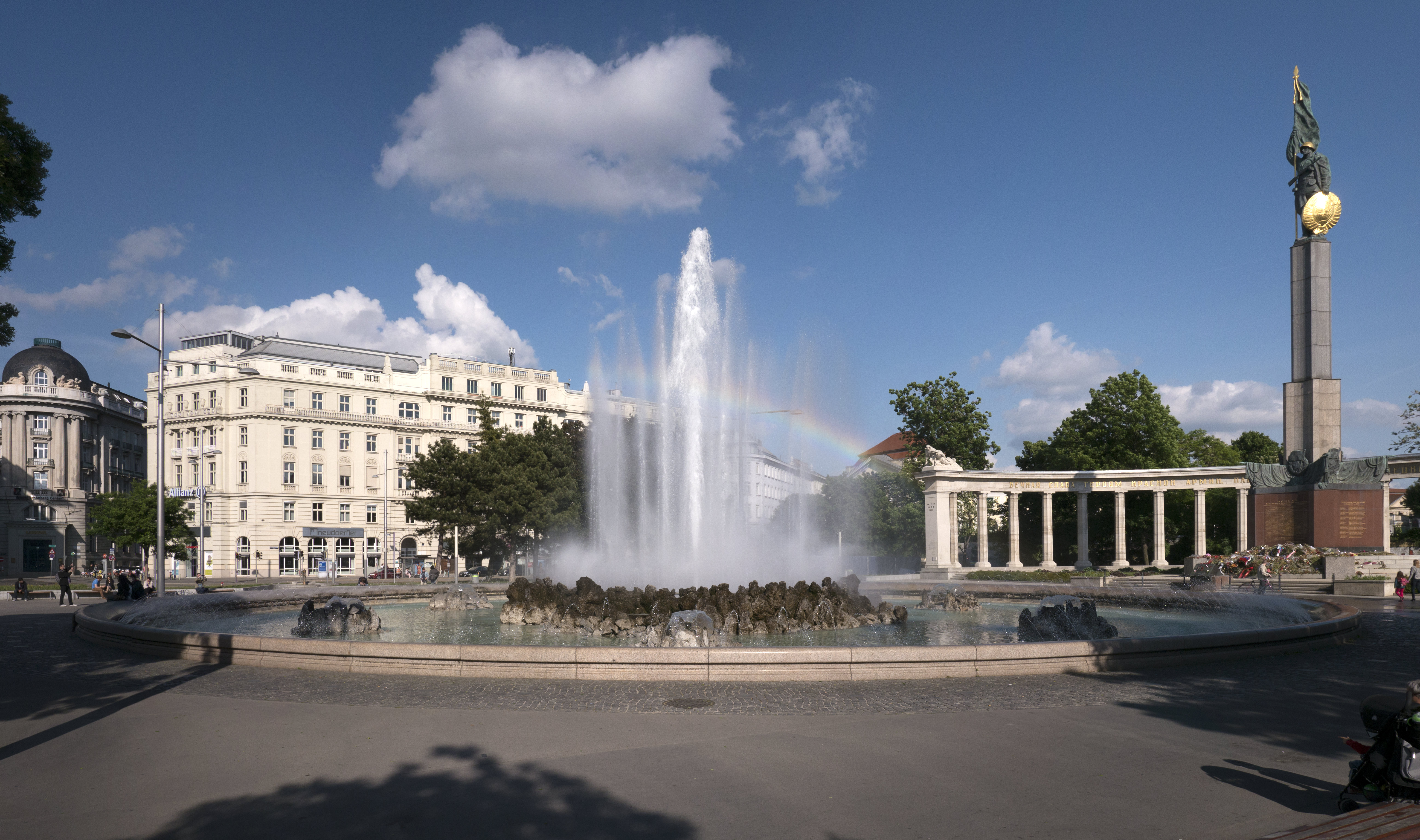 Hochstrahlbrunnen